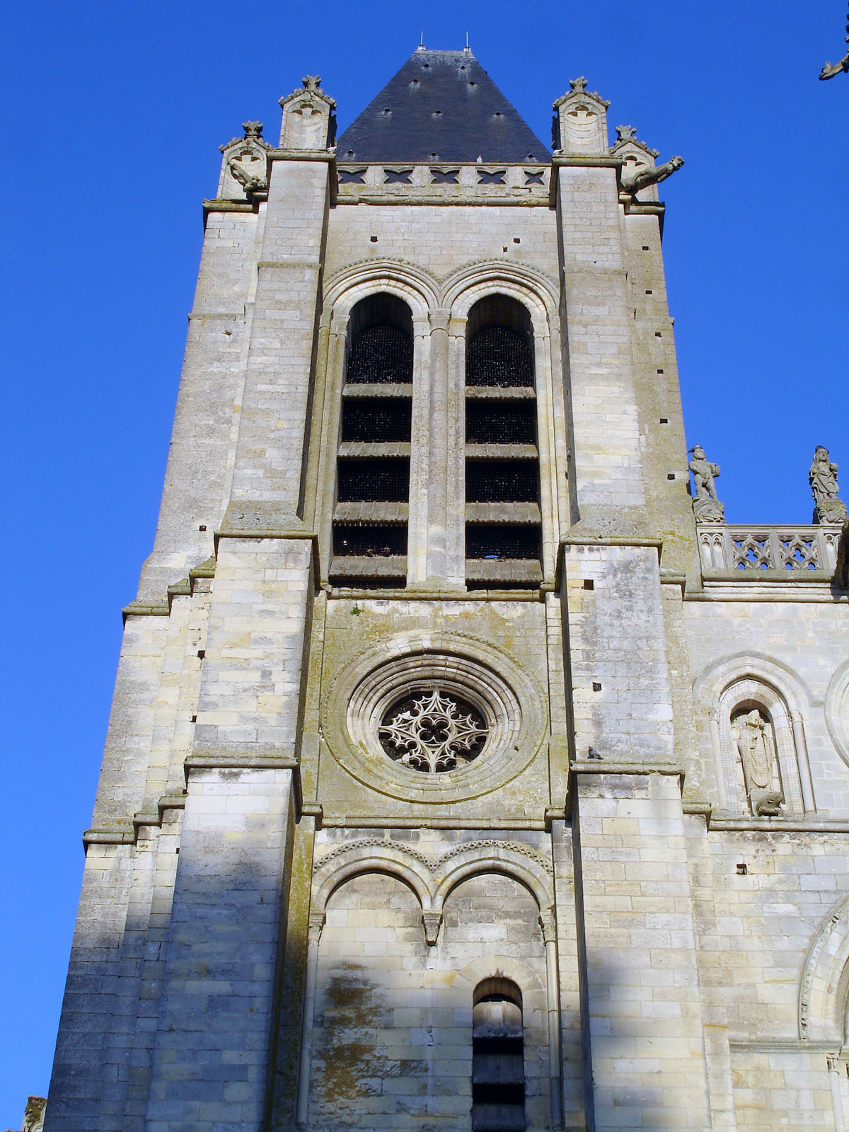 Tour nord (vue de l'ouest) de la cathédrale Notre-Dame de Senlis, Oise, France.